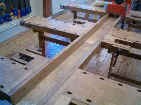 En bilade er renden for enden af en høvlebænk (eller i dette tilfælde to rækker kolonnehøvlebænke), hvor værktøj og materialer kan lægges midlertidigt. Ordet kom til os fra plattysk Bilåd, og på højtysk hedder det Beilade, en "lade" = et rum ved siden af.